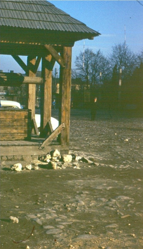 Fragment rynku w Sławkowie (woj. śląskie), 1975 r.